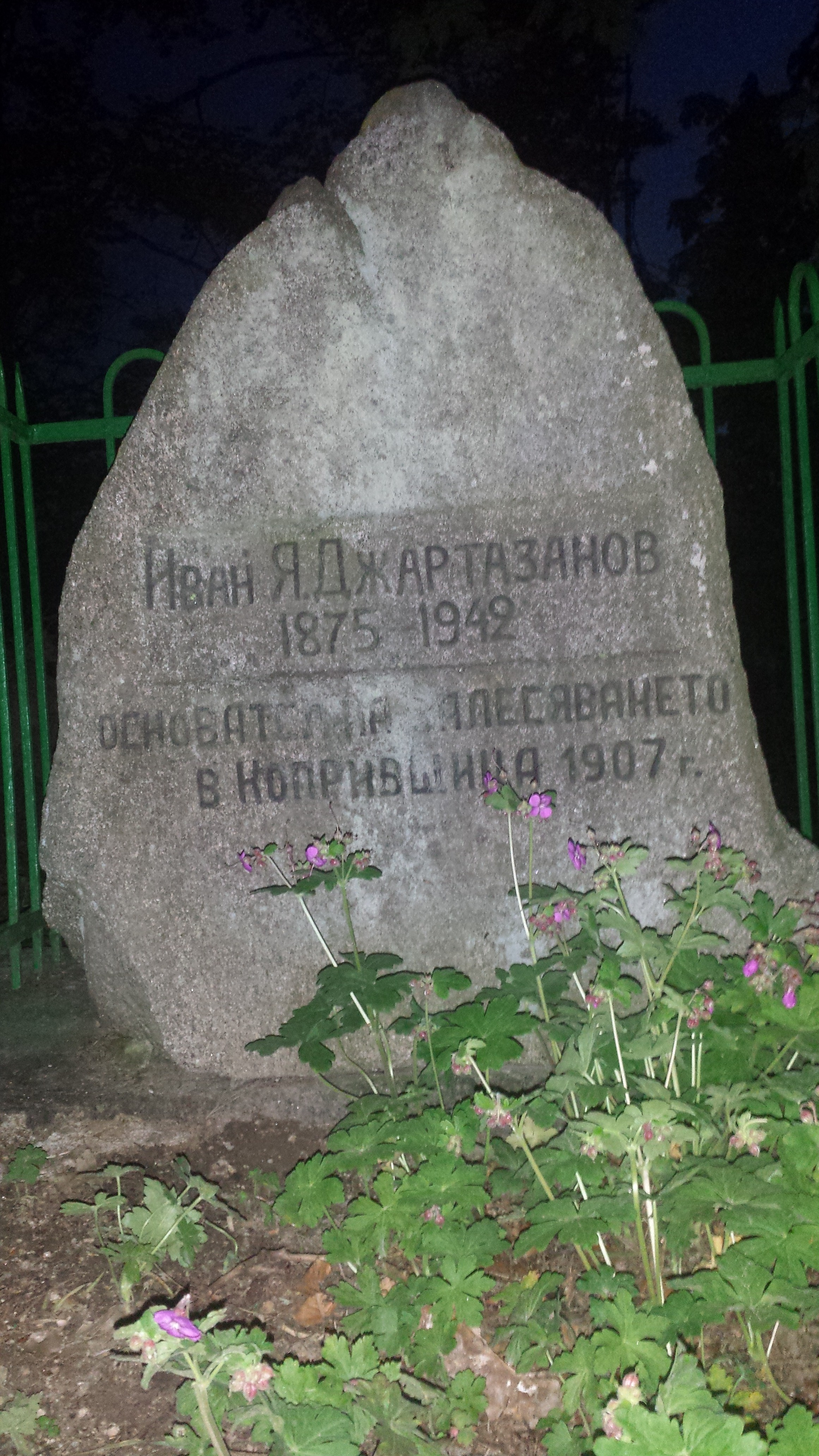 Надгробният паметник на Иван Джартазанов